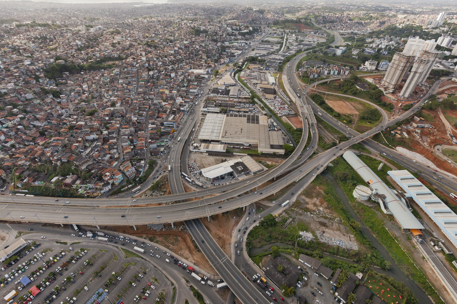 Vista aérea dos viadutos da Rótula do Abacaxi, o Rio Camarajipe recebendo as águas do Rio das Tripas e a Estação Acesso Norte (azul, no canto inferior direito) da Linha 1 do Metrô de Salvador, em Salvador.